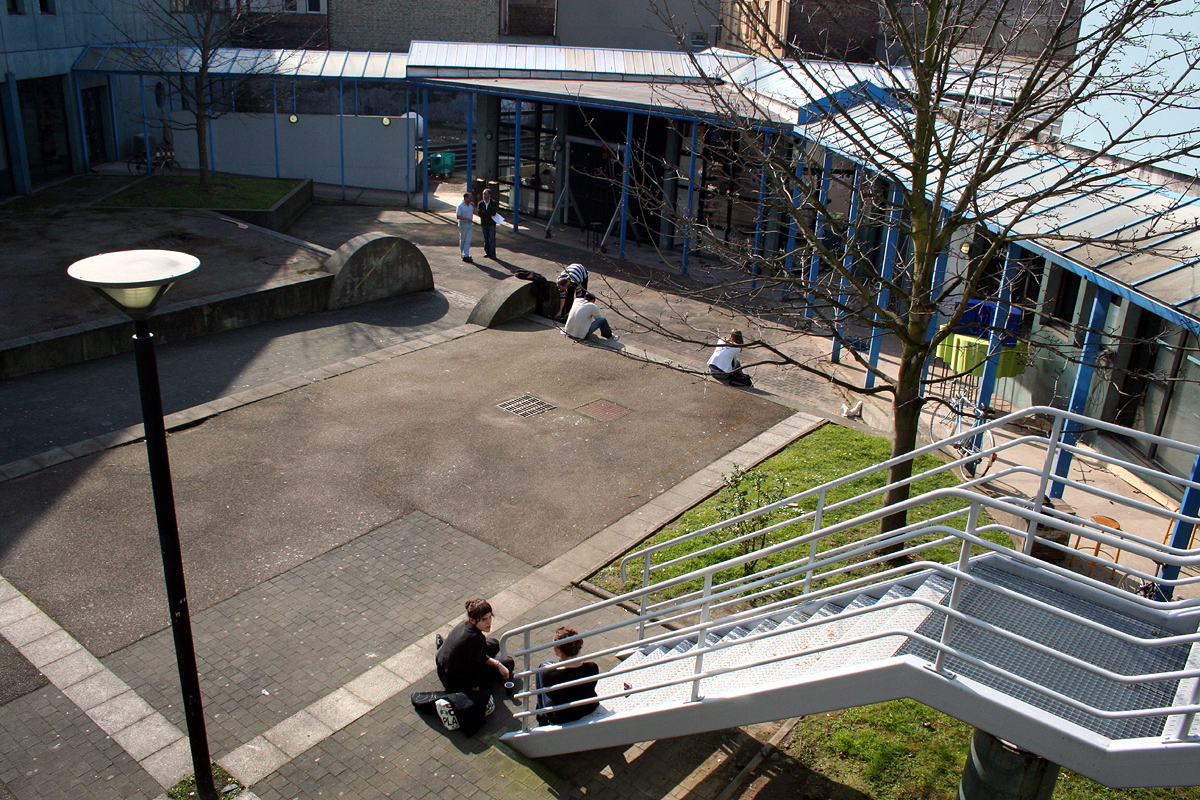 The Art School (école supérieure d'art), Le Havre, France